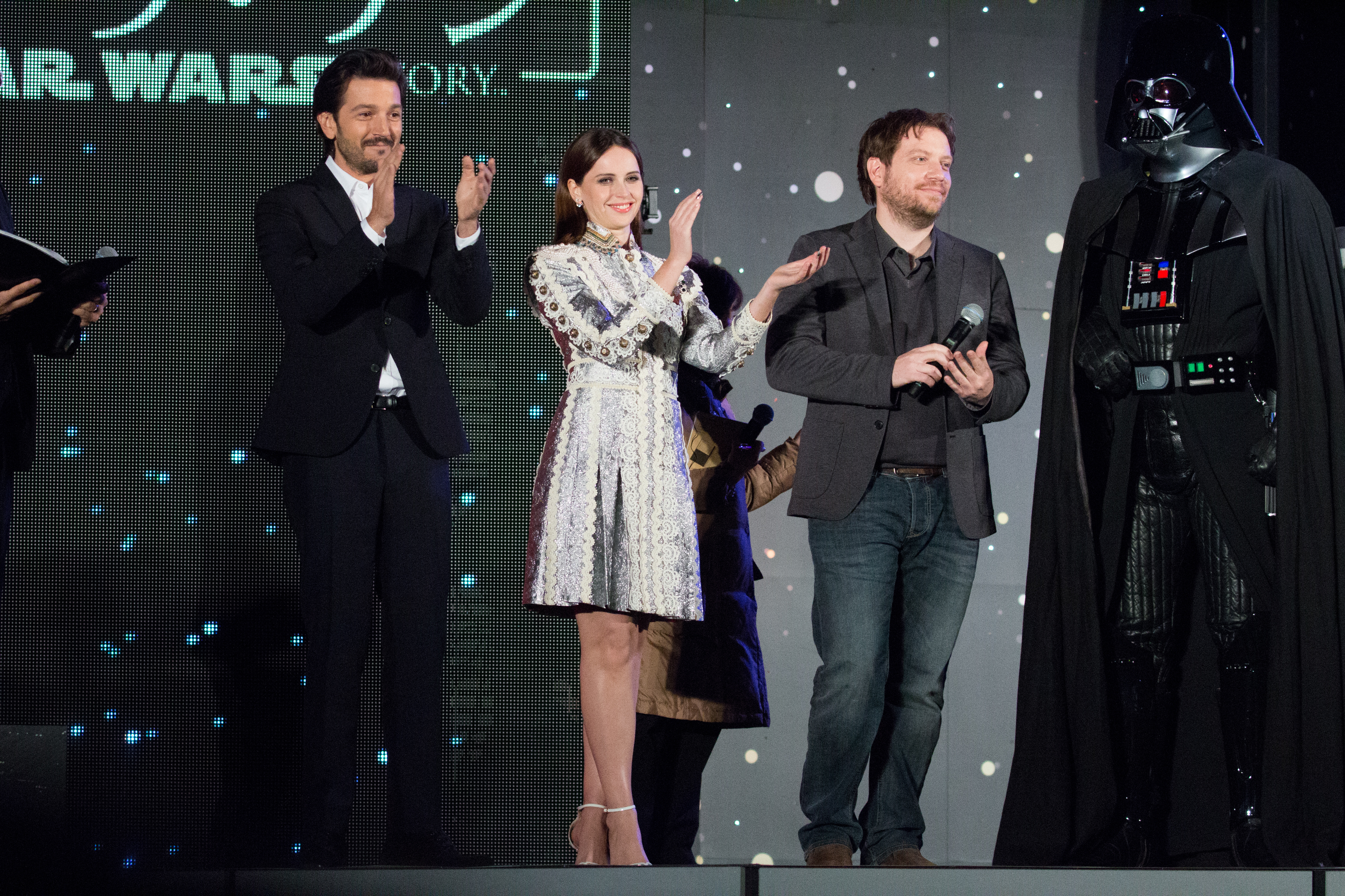 ローグ・ワン/スター・ウォーズ・ストーリー ジャパン・プレミア レッドカーペット ディエゴ・ルナ フェリシティ・ジョーンズ ギャレス・エドワーズ